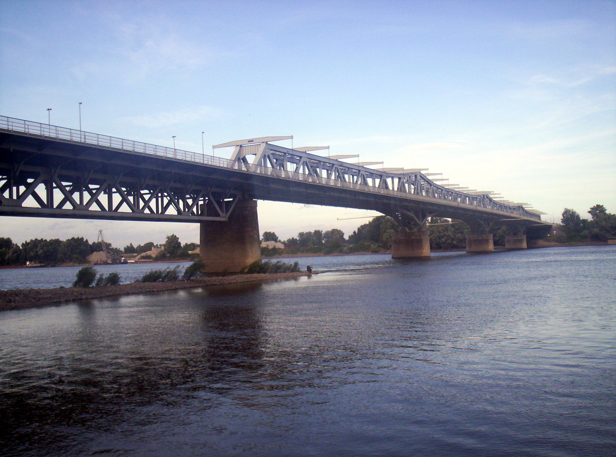 A Türr István-híd Baján